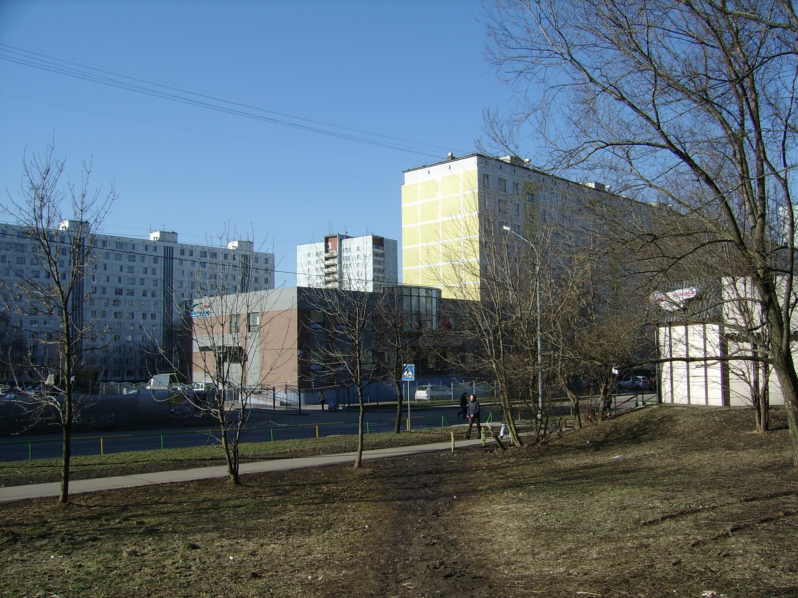 Москва, проезд Шокальского, дом 30, корпус 1. Здание Управы района «Северное Медведково».